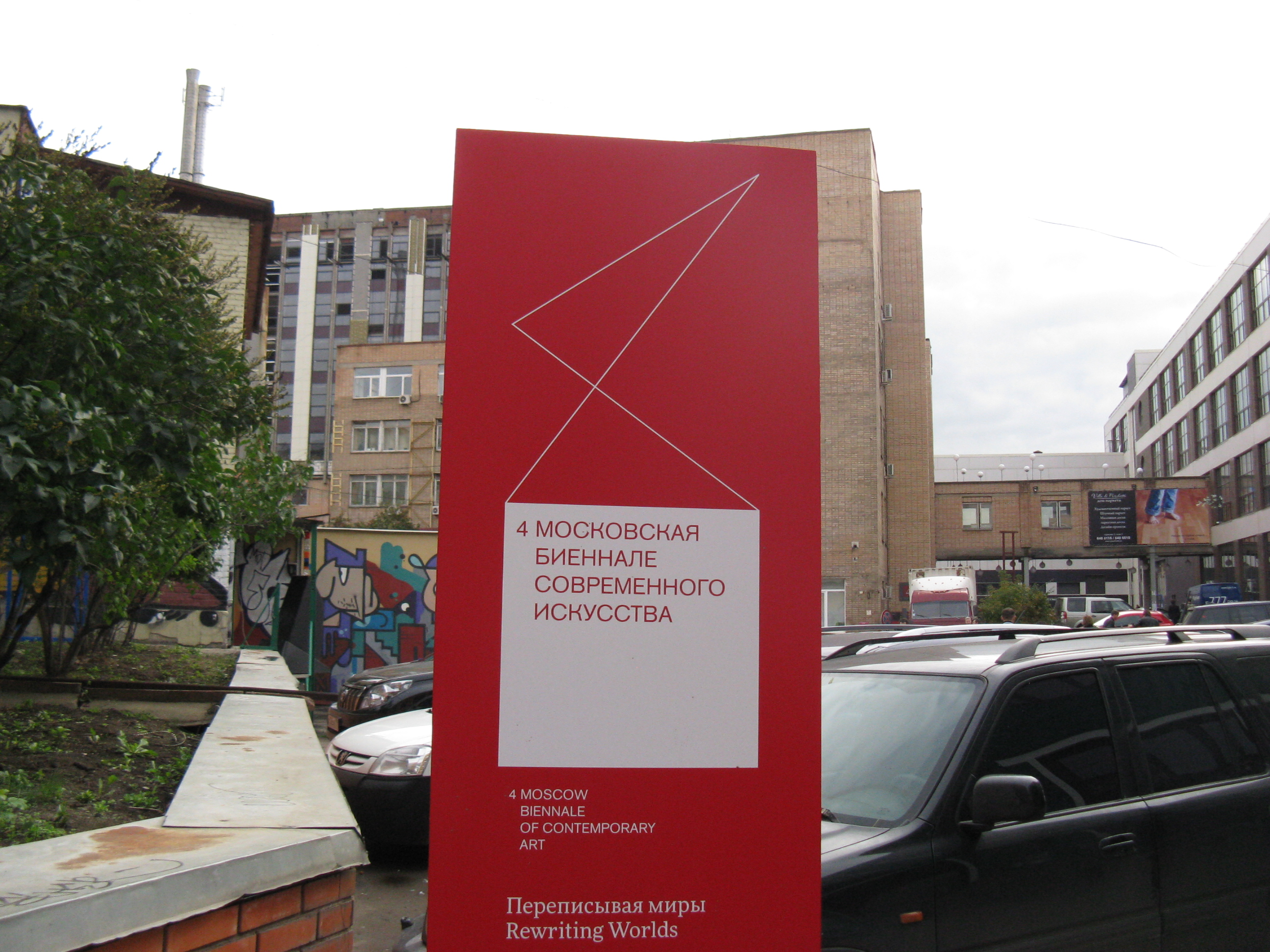 Информационная доска с логотипами 4-й Московской биеннале, размещённая на пути к основному проекту биеннале в «Артплее».